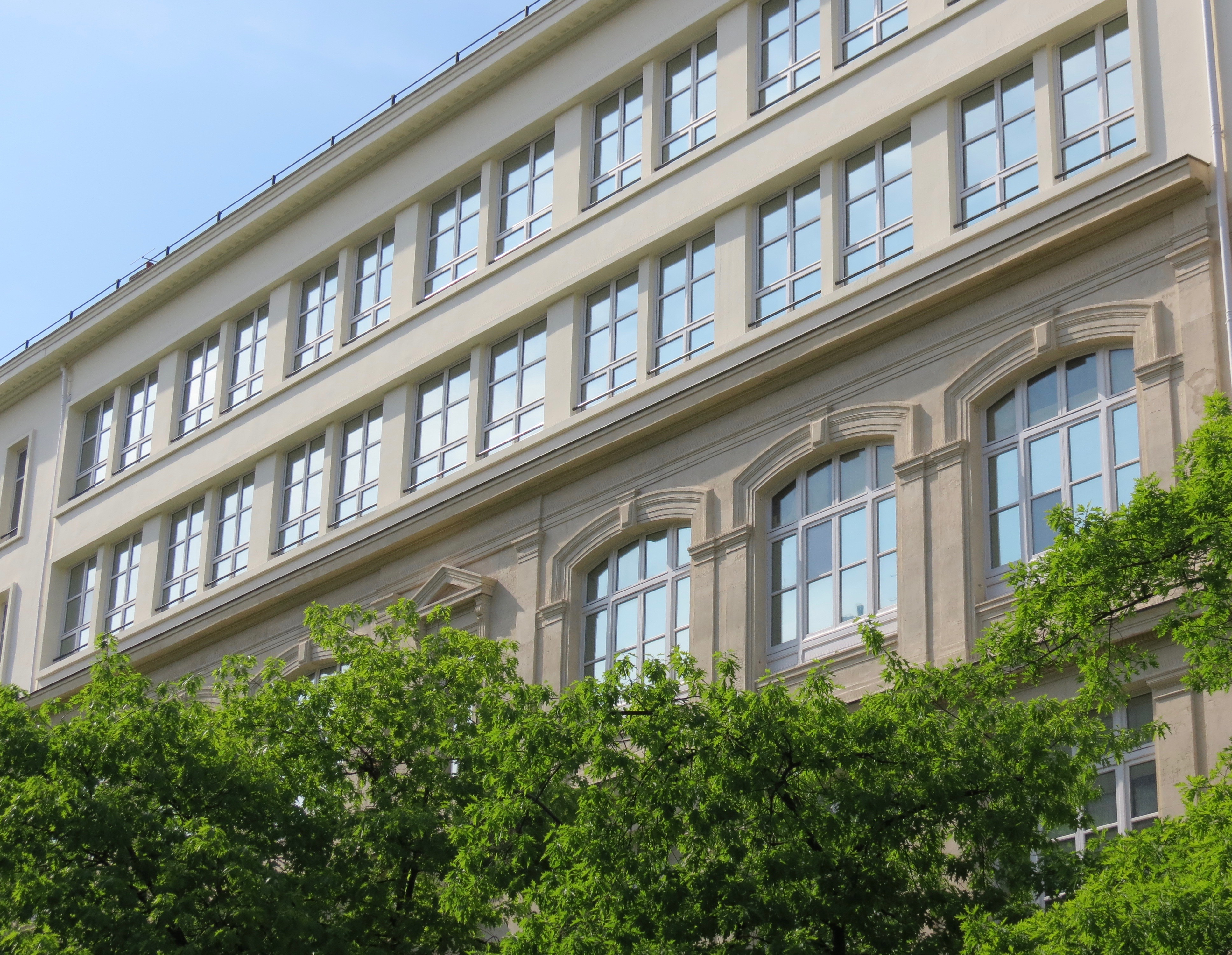 Façade du Lycée Turgot à Paris.